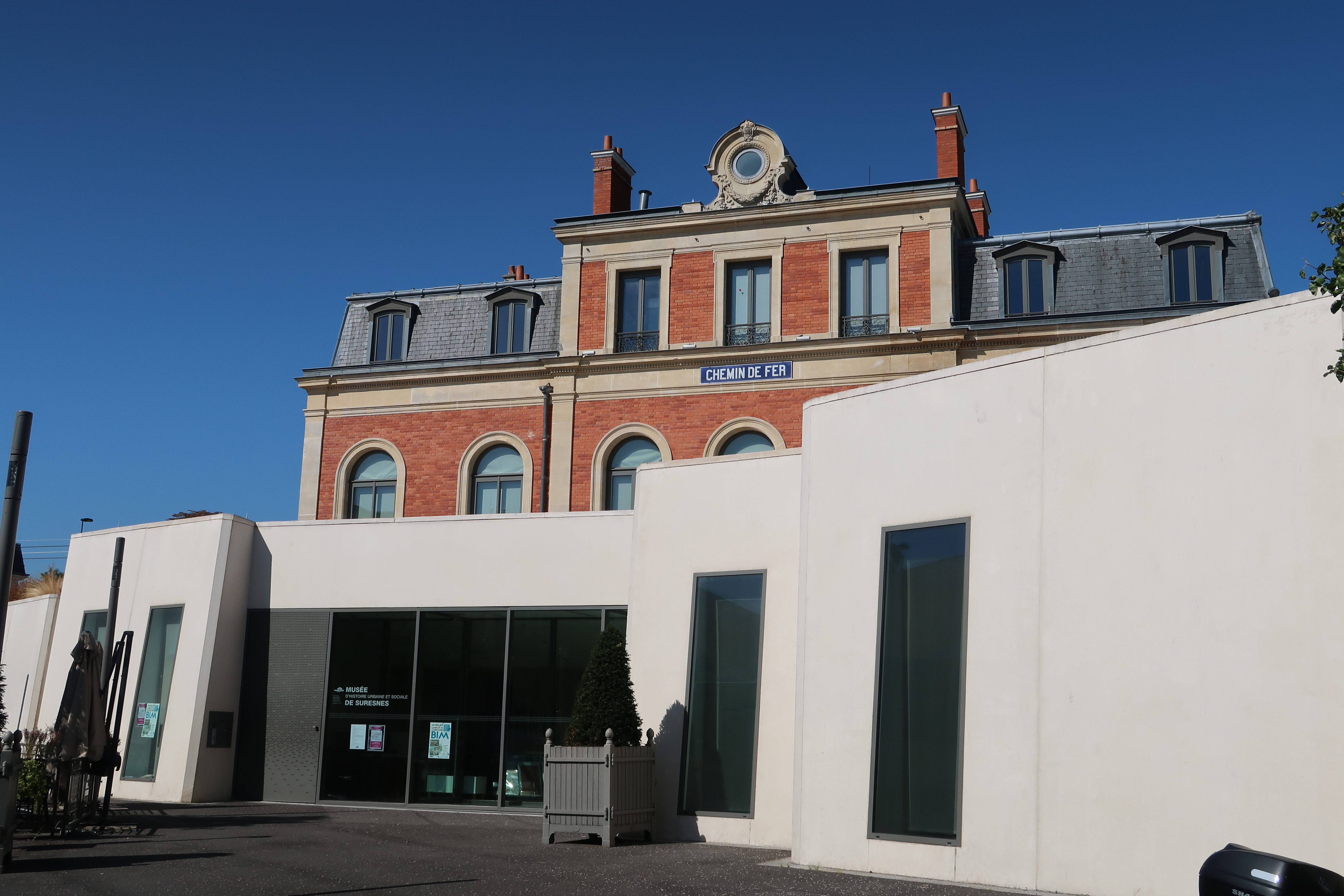 Musée d'histoire urbaine et sociale de Suresnes (Hauts-de-Seine).